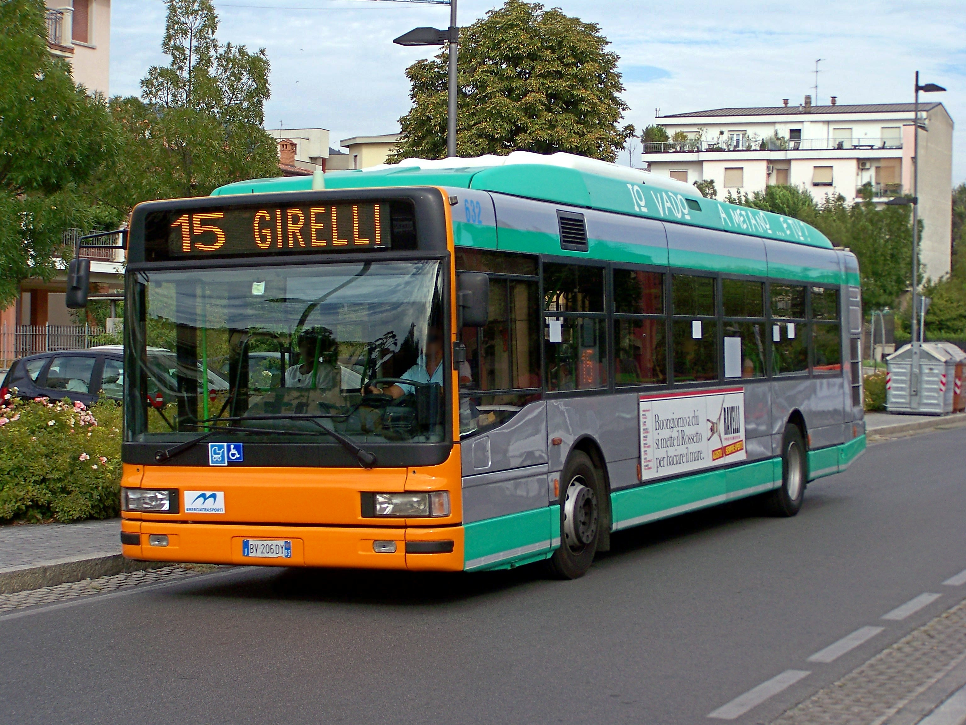 L'Iveco Cityclass di Brescia Trasporti nr. 632 in via Sardegna, mentre espleta servizio sulla linea 15 in direzione del quartiere Girelli. Un passaggio dovuto alla deviazione necessaria per la chiusura di via Corsica a causa dei lavori per il teleriscaldamento.